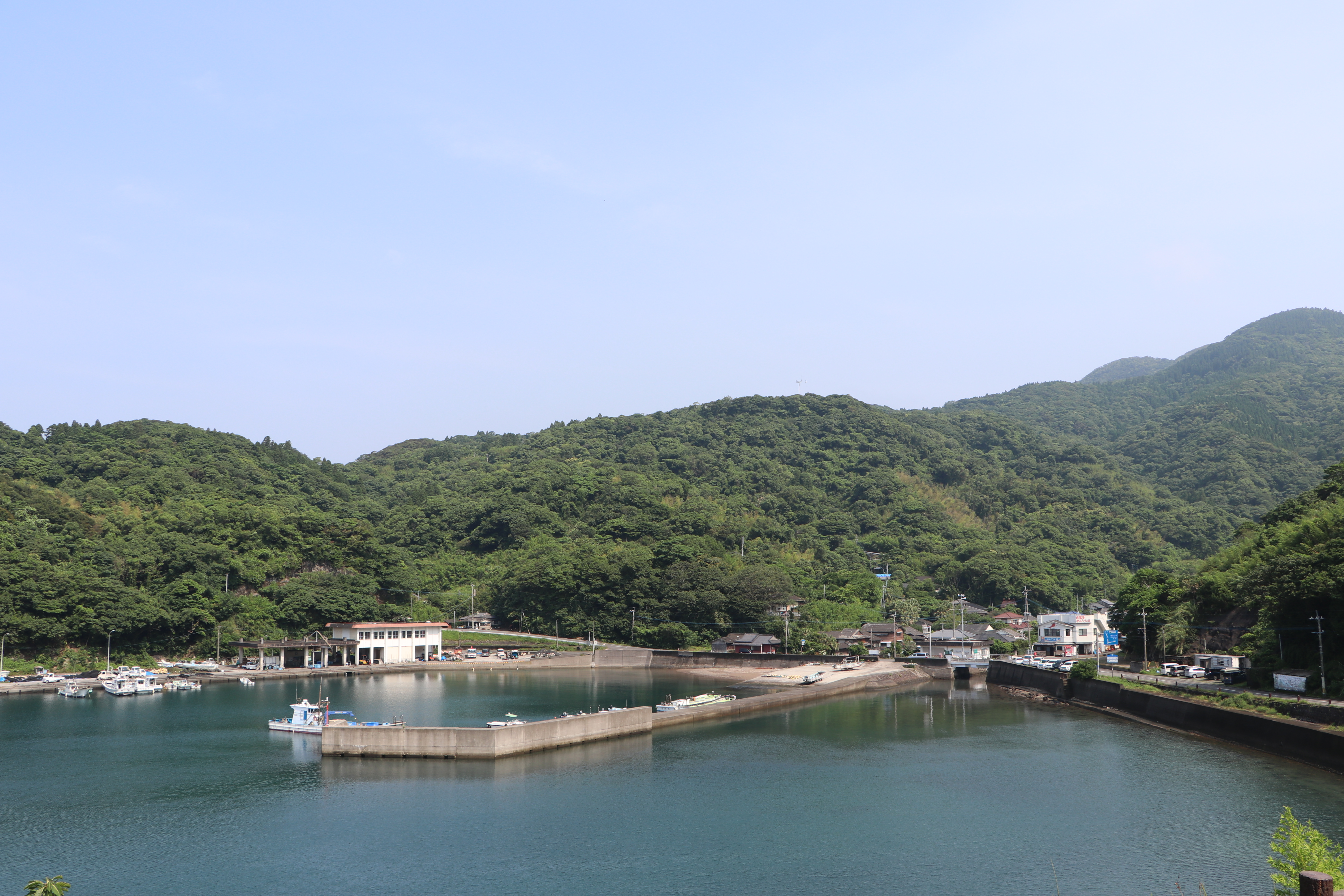 坊津町秋目の集落と秋目港 Canon EOS 80D